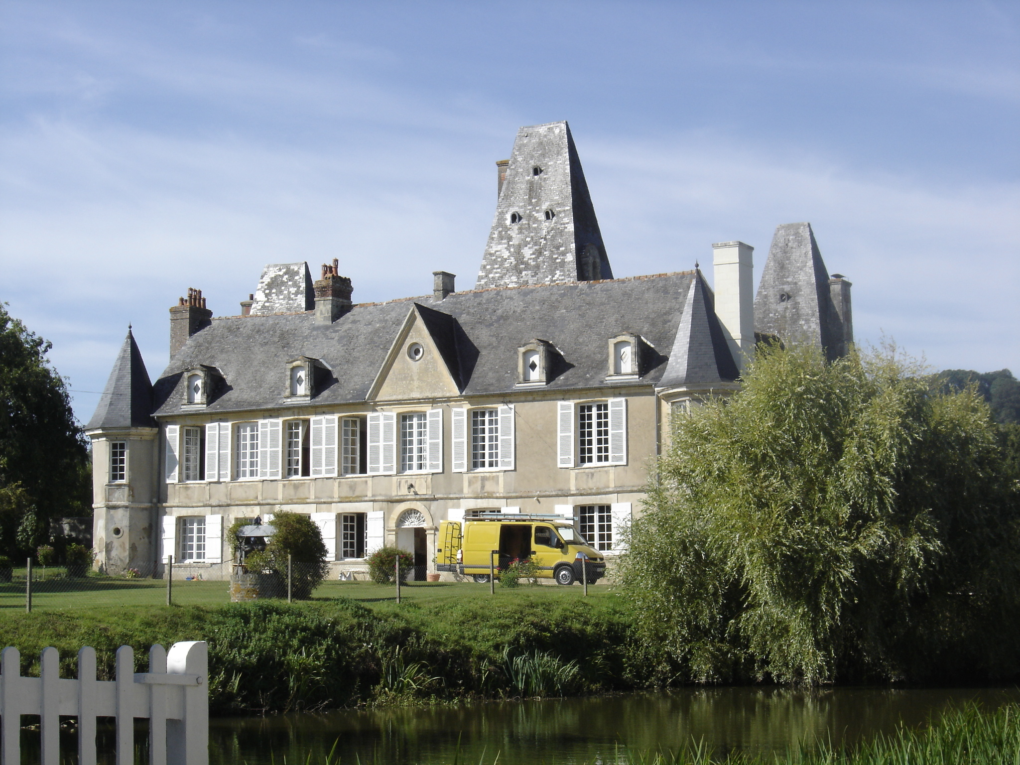 la façade sud du château modifiée au XVIIIè siècle est en pierre calcaire. La porte centrale est surmontée d'un fronton percé d'un oculus et deux petites tours hexagonales coiffées de poivrières complètent la symétrie de cette partie du bâtiment, à peine troublée par le toit à quatre pans de la massive tour centrale de l'autre façade du XVIè siècle en brique et pierre. .